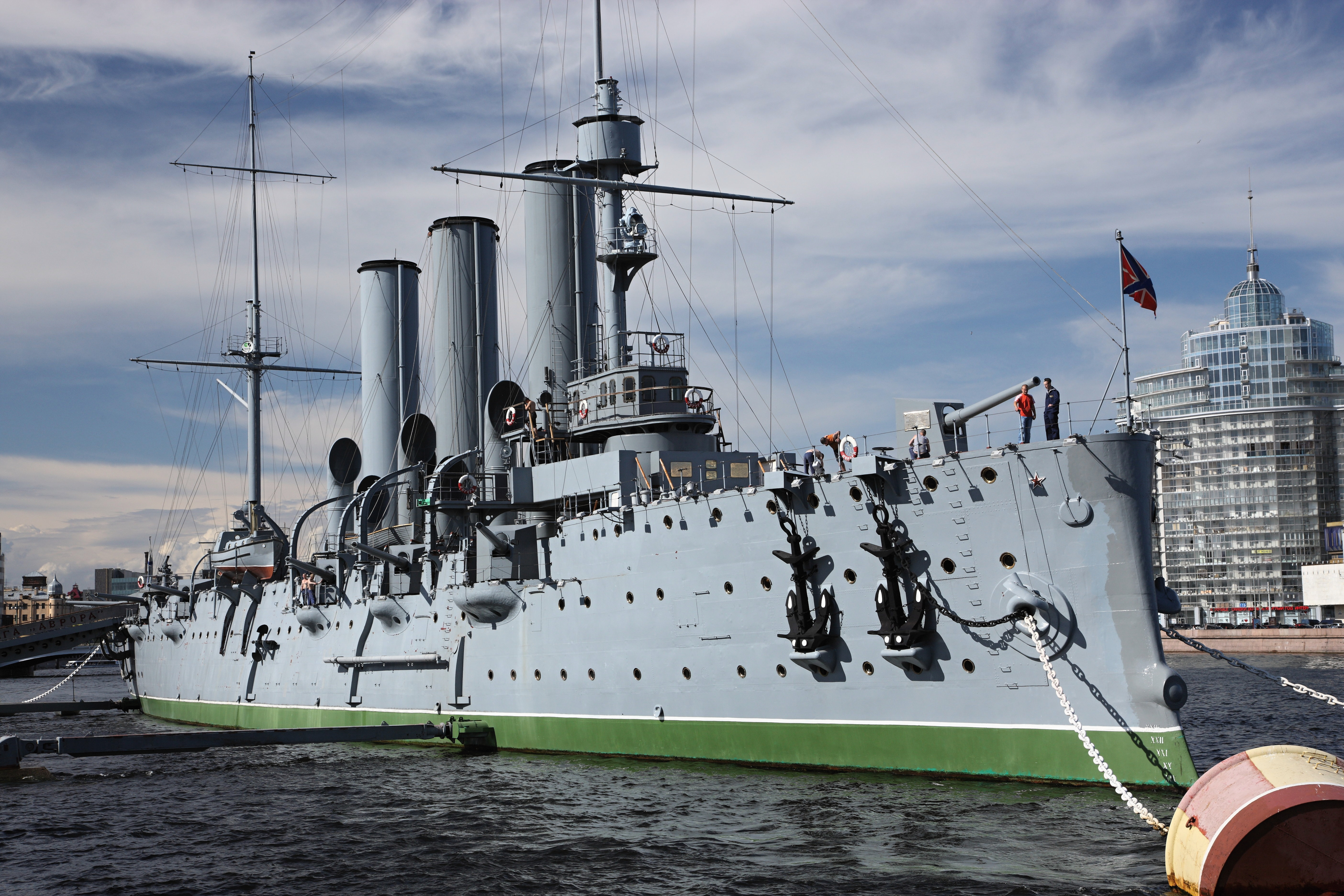 Leningradská povinnost: křižník Aurora